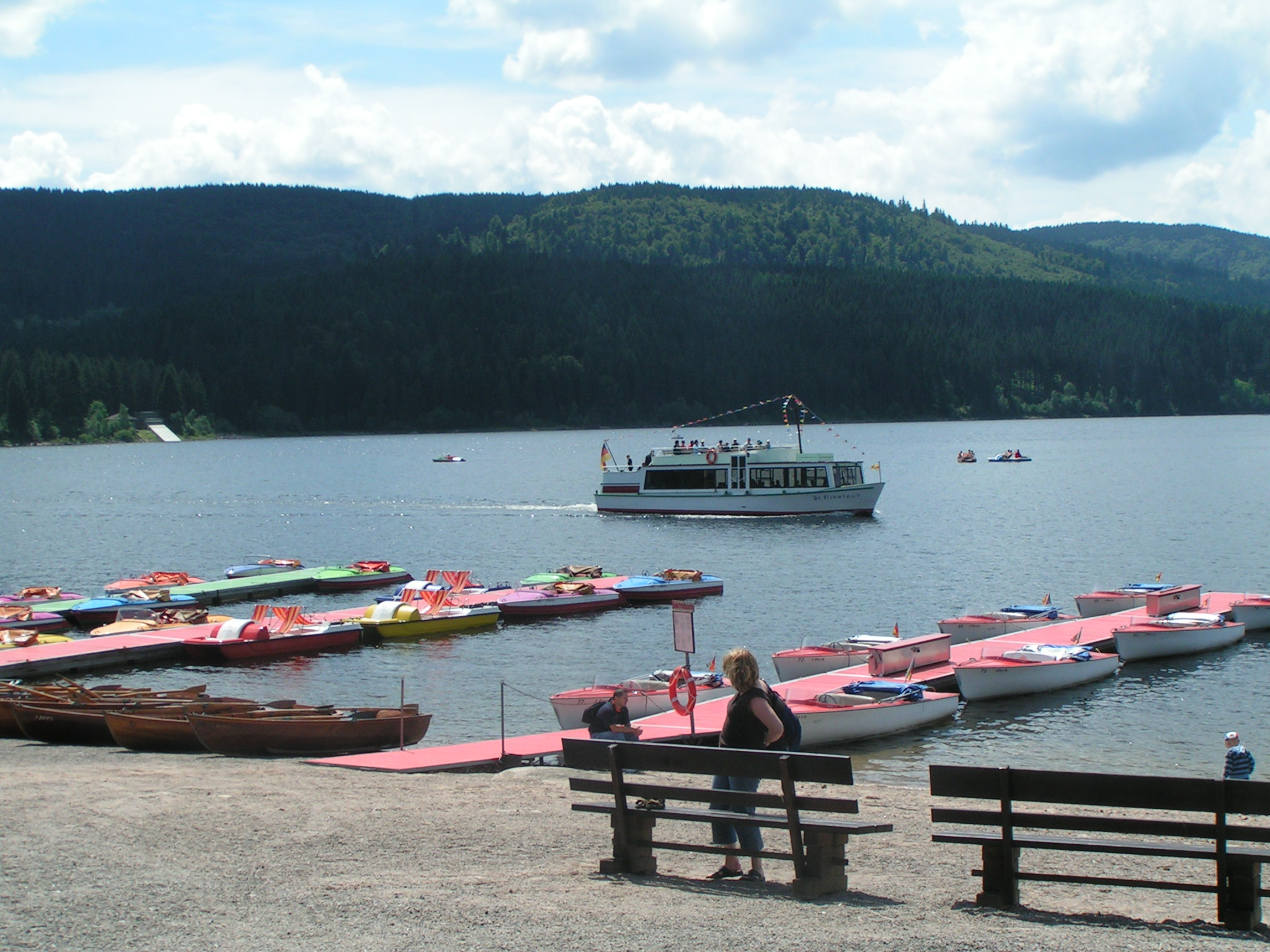 Touristische Nutzung des Schluchsees im Schwarzwald